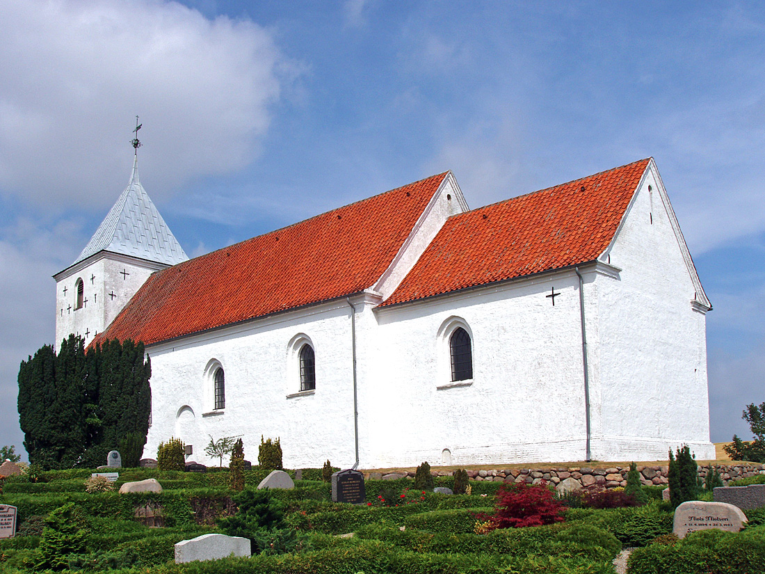 Ovsted Kirke Skanderborg Kommune, Voer Herred, Jylland, Denmark